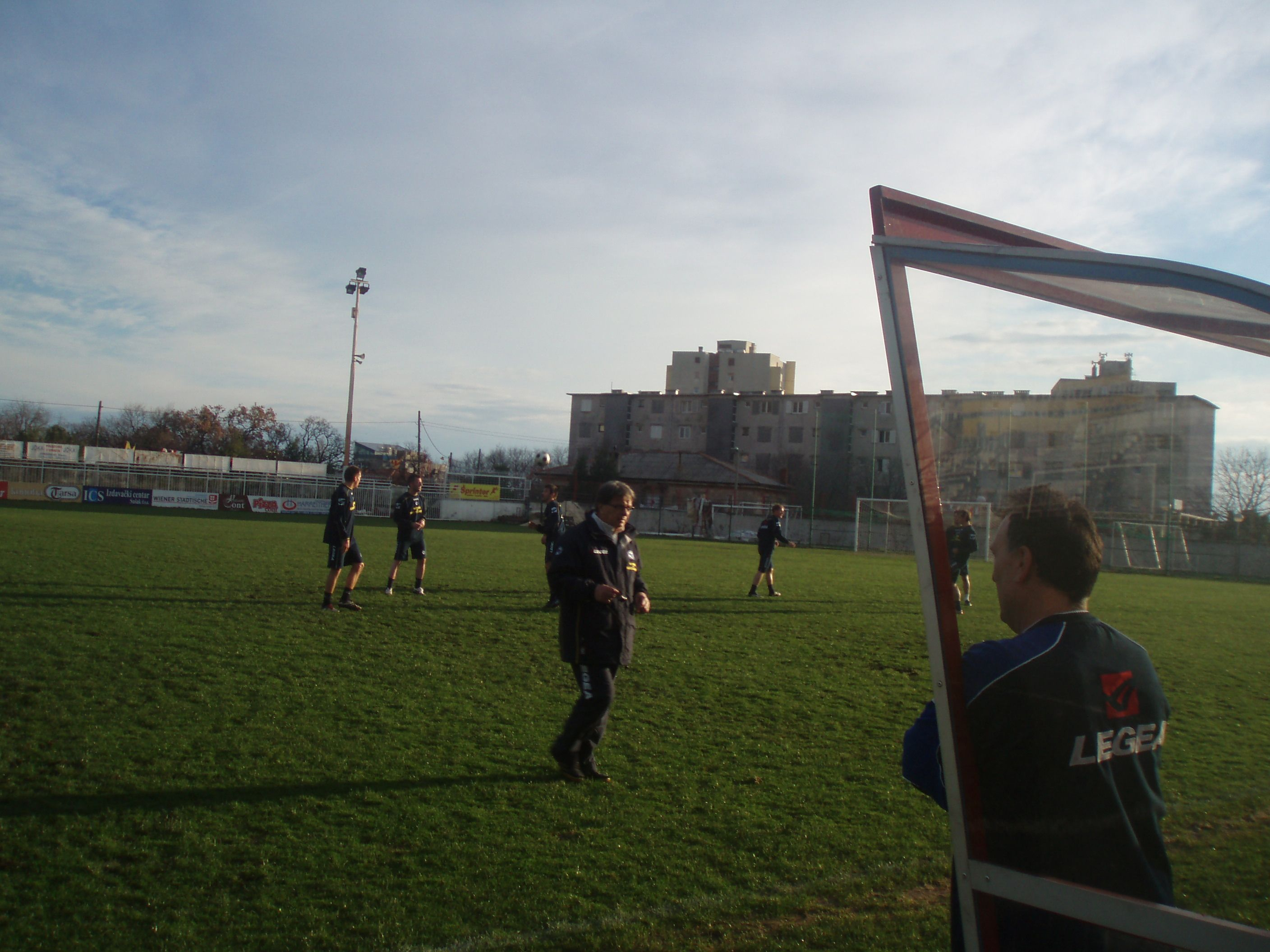 Ćiro Blažević na Orijentovom igralištu u Rijeci